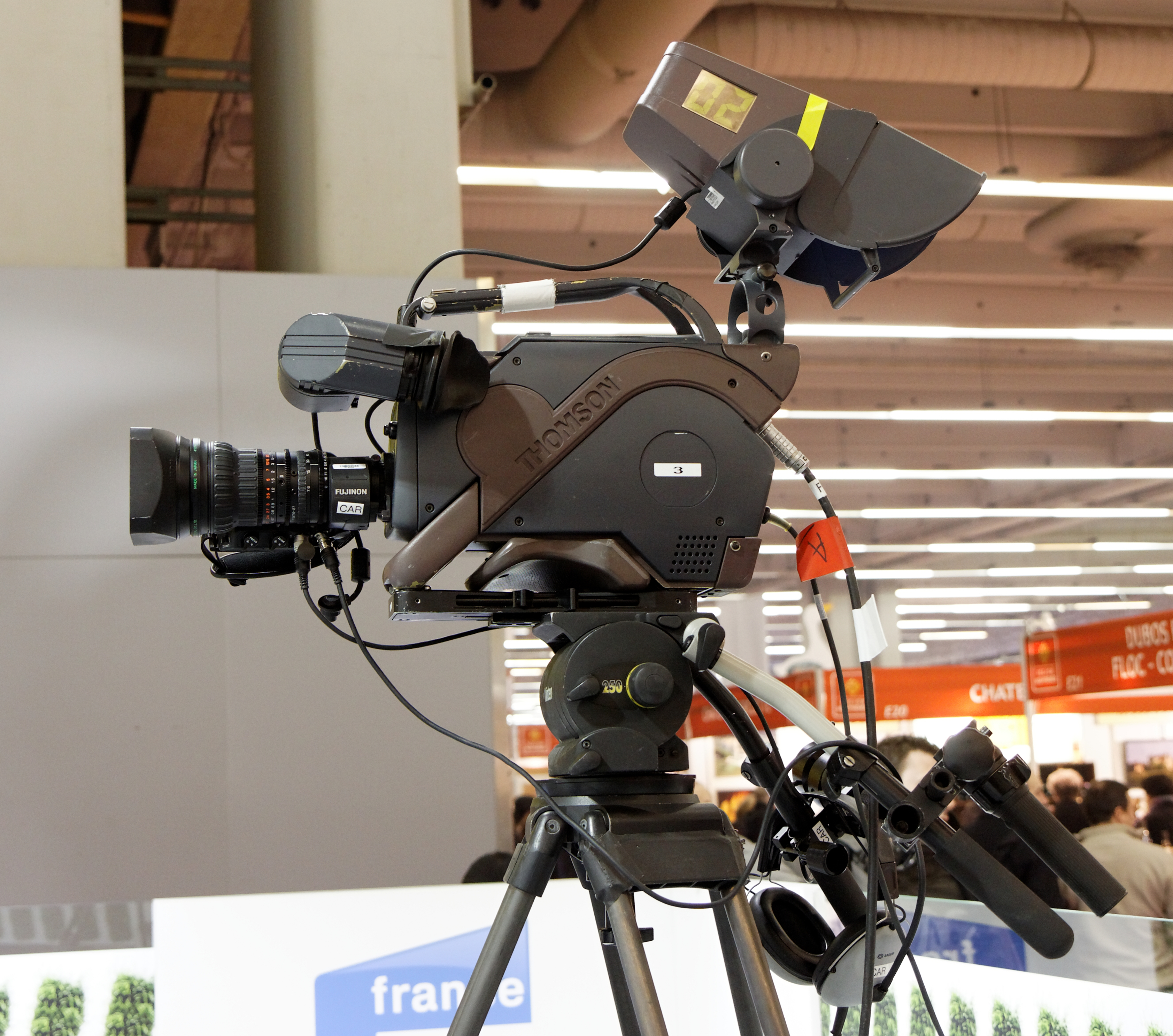 Le salon de l'agriculture de Paris en 2011.Caméra numérique Thomson TTV-1707 sur le plateau France3 au salon de l'agriculture